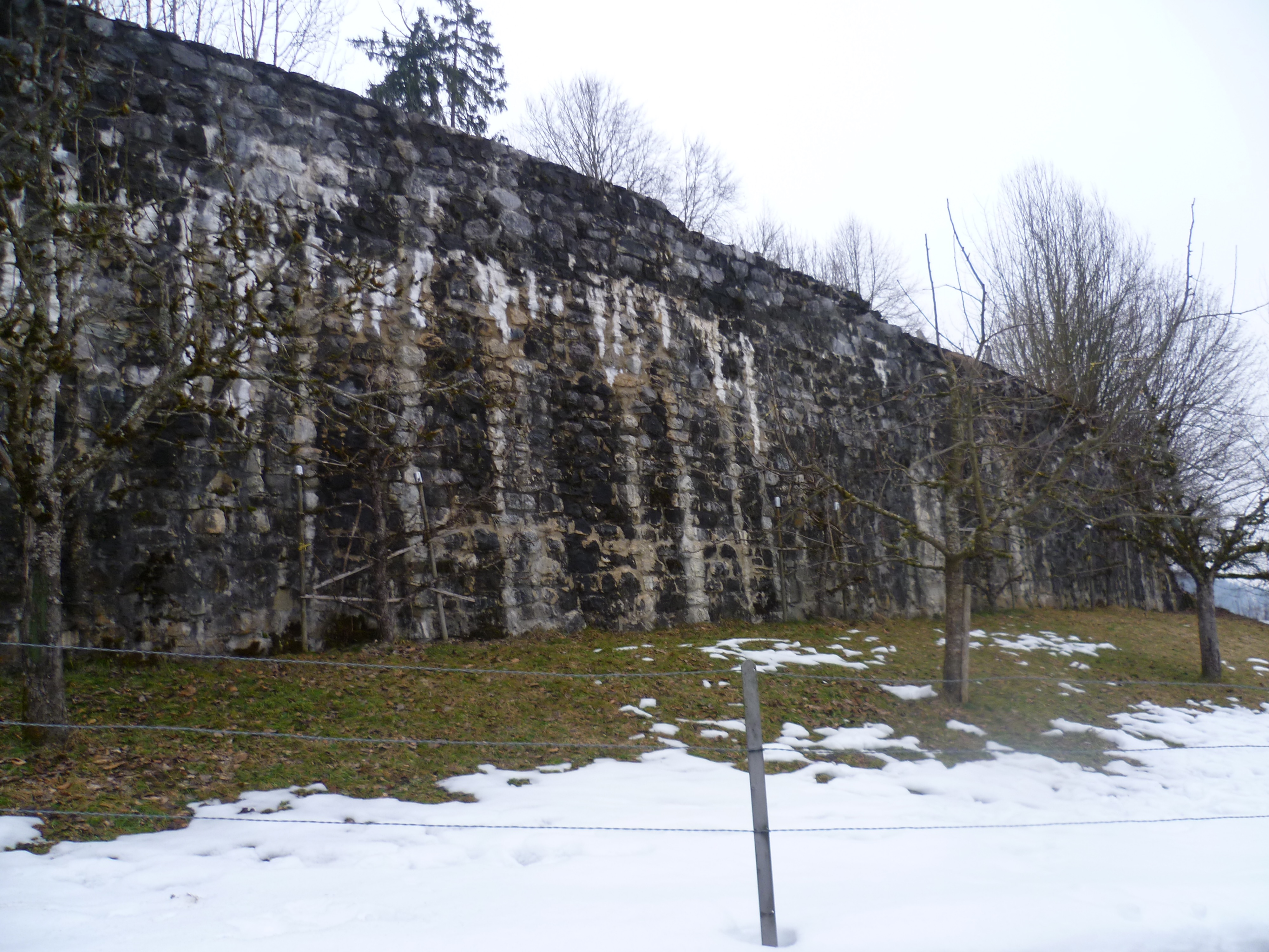 Die 45 Meter lange, gut erhaltene Südmauer der Burgruine Weissenburg in der Schweizer Gemeinde Därstetten.